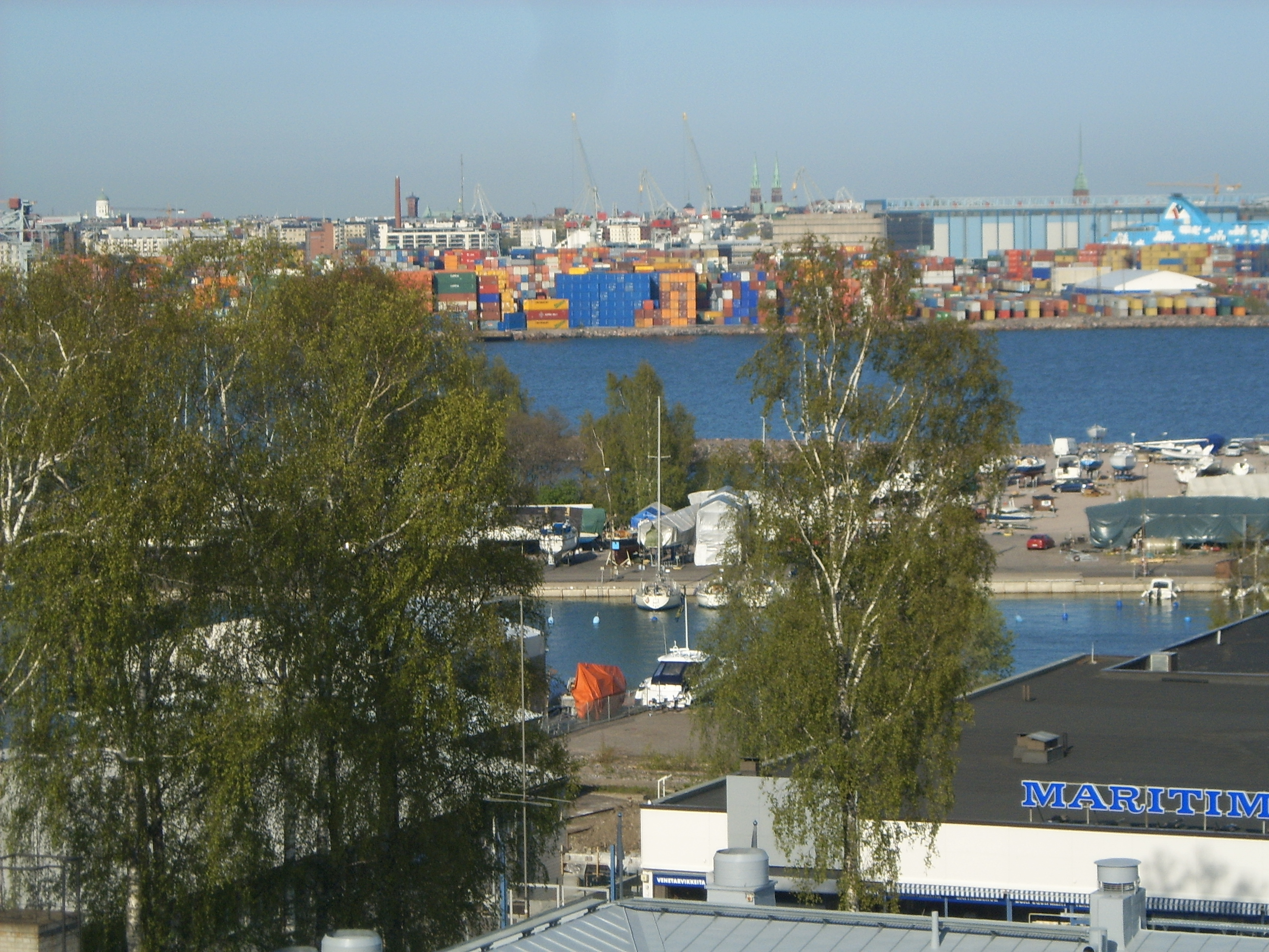 Näkymä Vattuniemestä